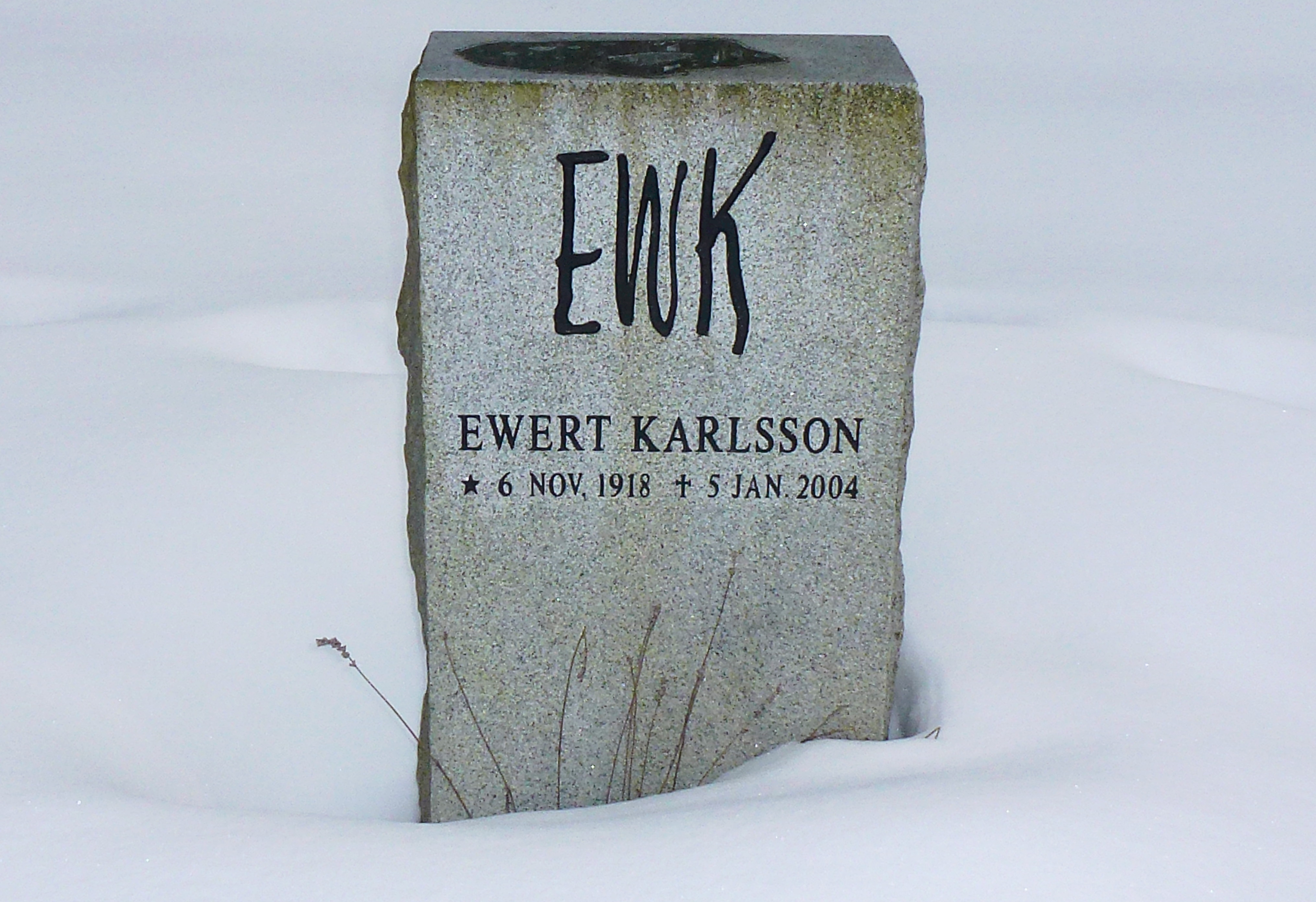 Sankt Botvids begravningsplats, gravplats för Ewert Karlsson